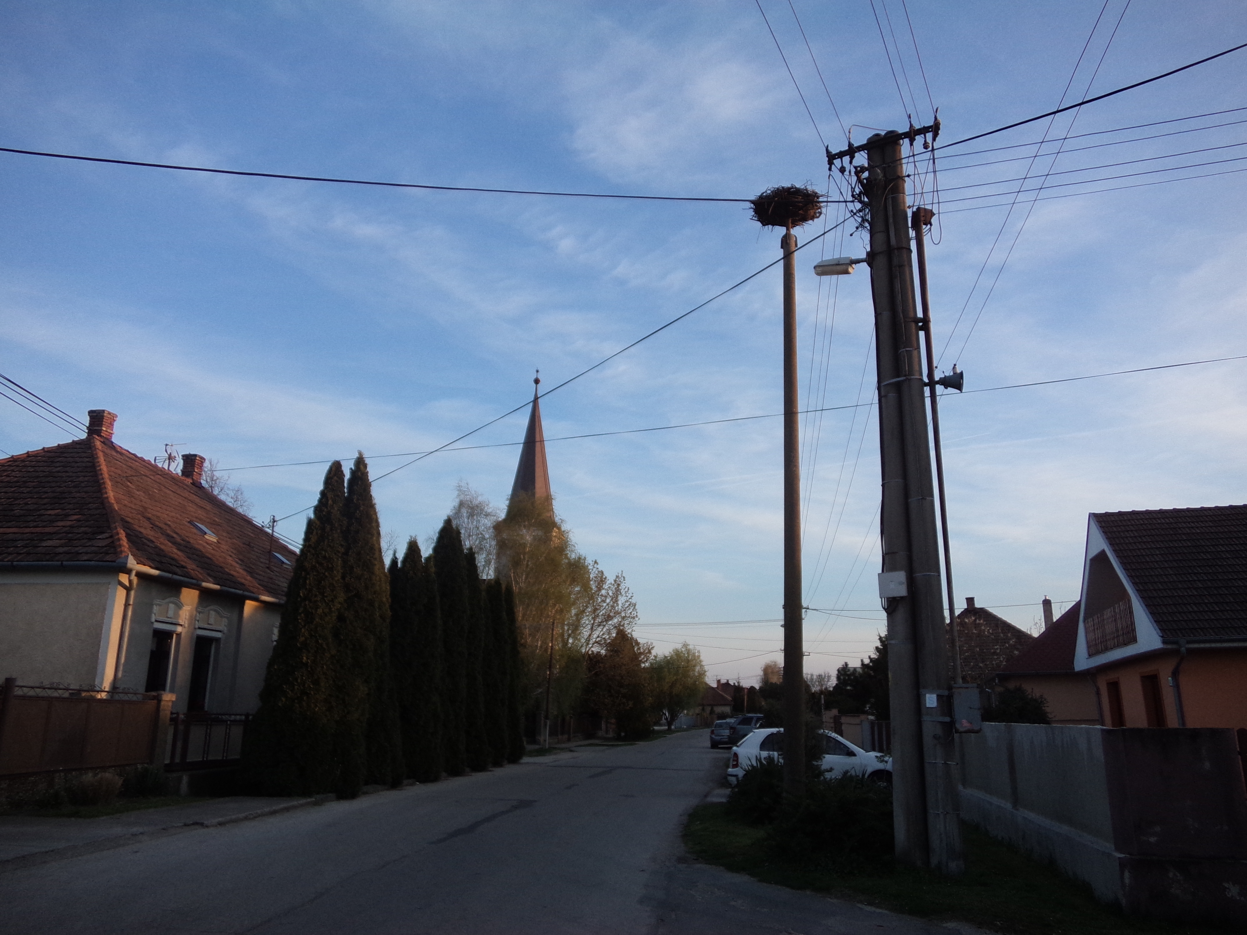 Nemeshódos